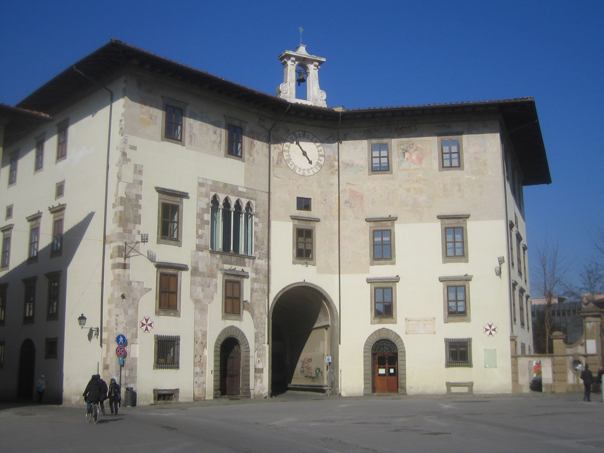 Palazzo dell'Orlogio à Pise